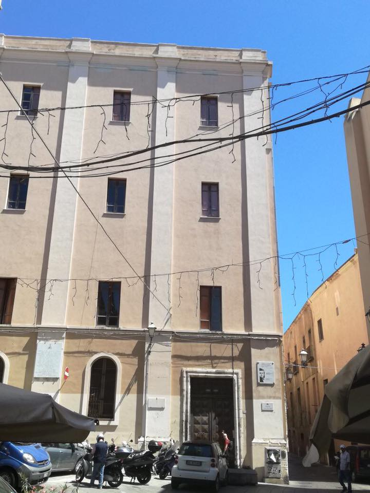 palazzo dettori e piazza